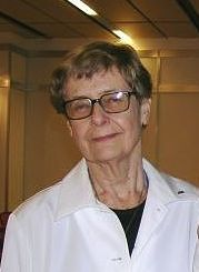 Профессор Алина Кабата-Пендиас